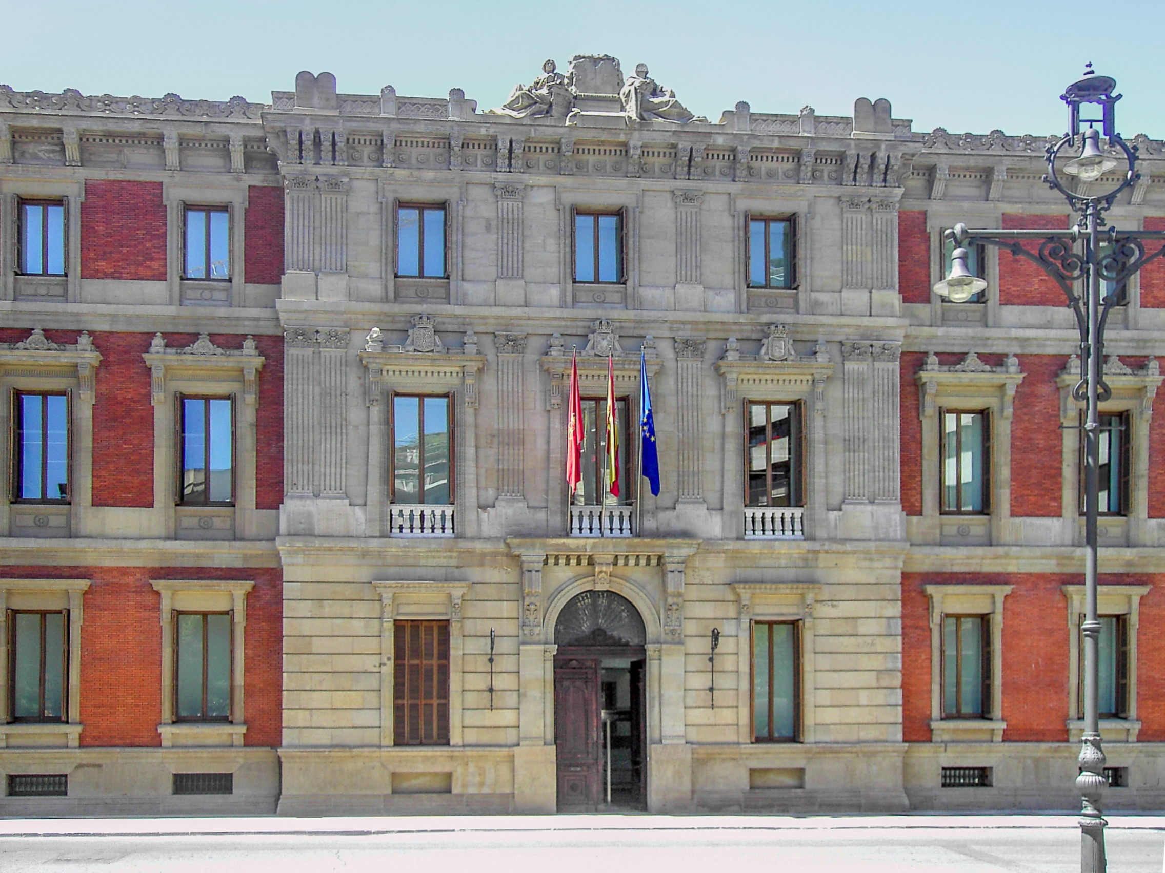 Parlemento de Navarra